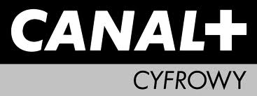 Logo spółki Canal+ Cyfrowy S.A.